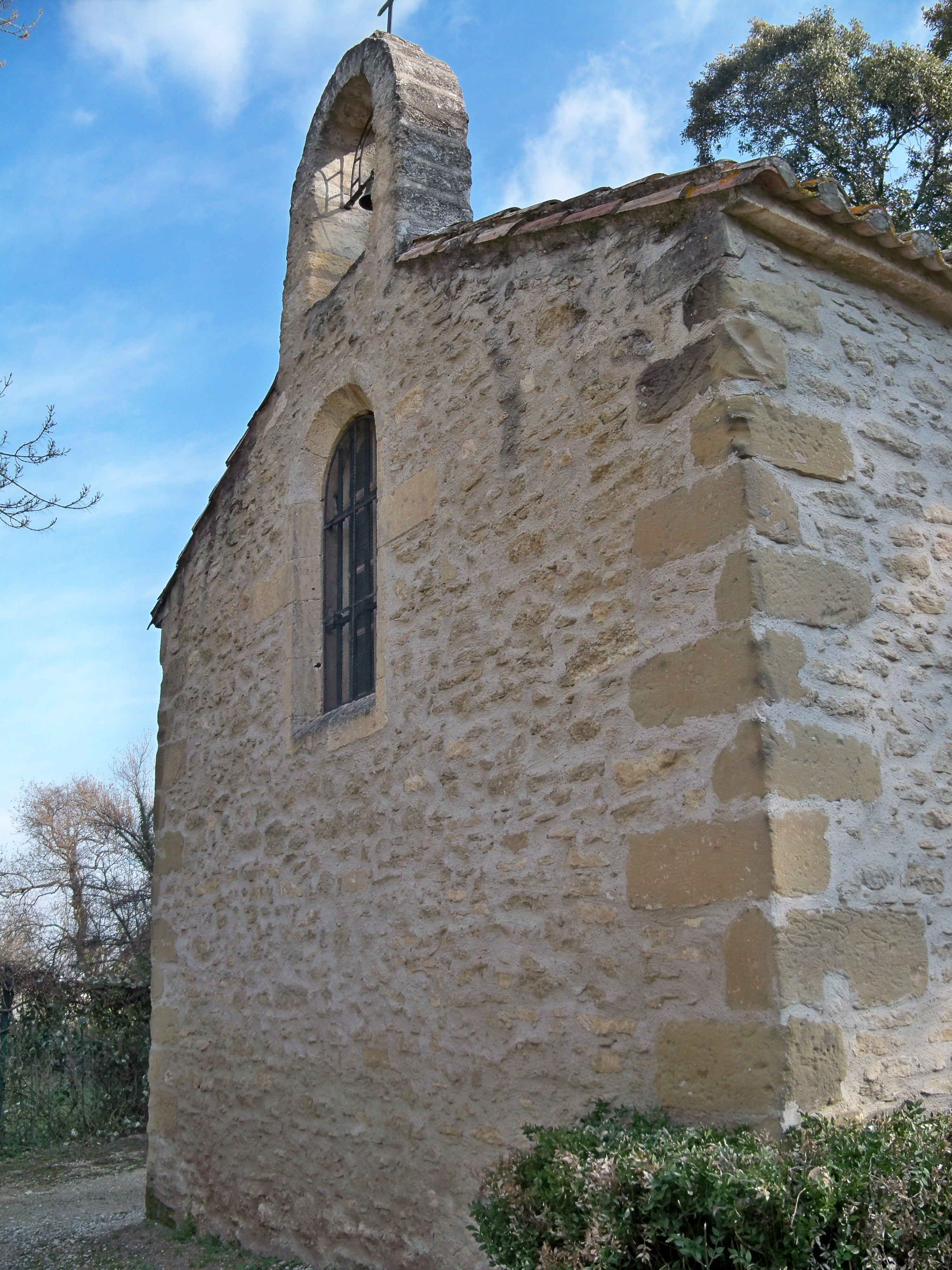 Facade de la chapelle saint Lambert à Mas Blanc des Alpilles (13), France